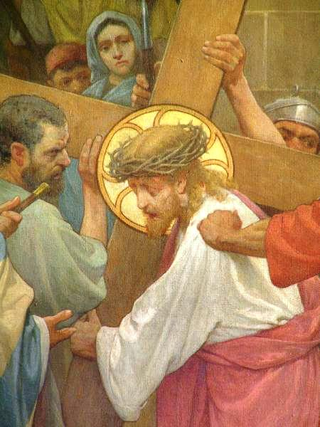 Detail van een kruiswegstatie van Jan Dunselman (1863-1931), in de Sint-Nicolaaskerk in Amsterdam.